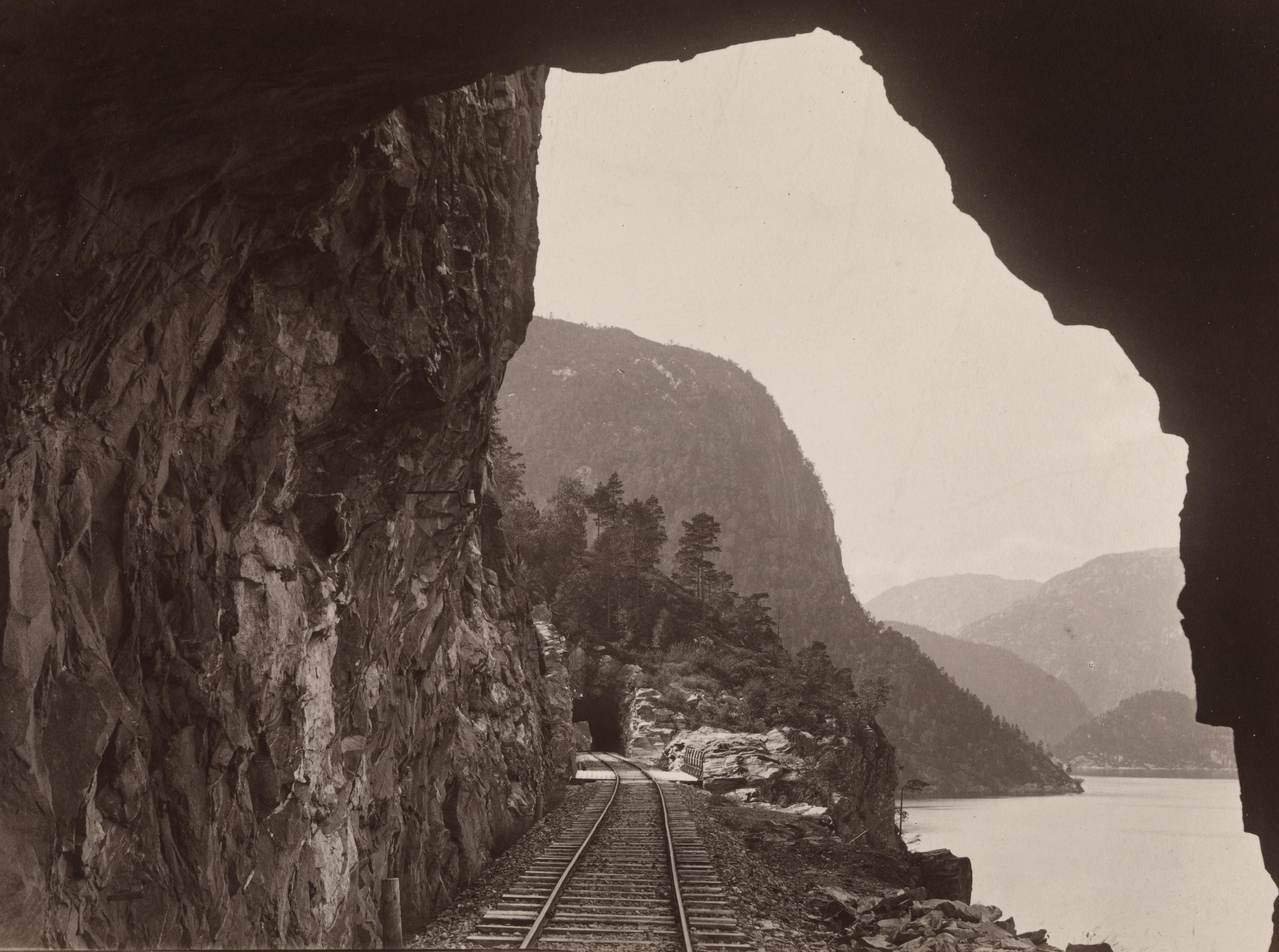 Bildet er hentet fra Nasjonalbibliotekets bildesamling Vaksdal, Hordaland